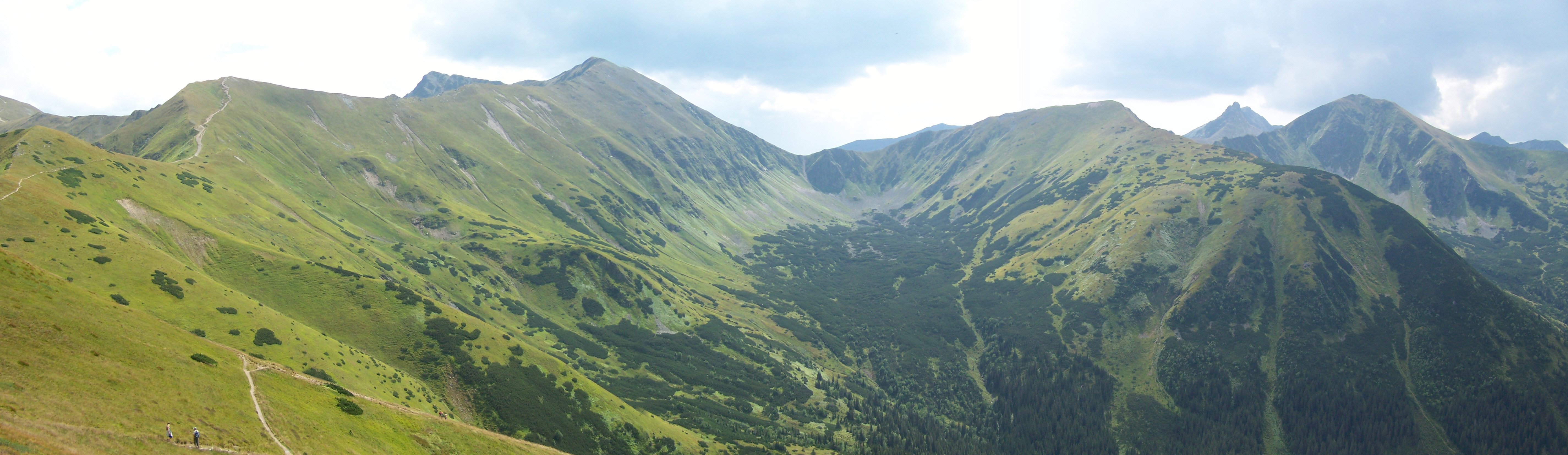 Widok z Trzydniowiańskiego Wierchu na Dolinę Jarząbczą i Niską Przełęcz ,po prawej Wołowiec i Łopata z Czerwonym Wierchem ,za nimi Ostry Rohacz ,z lewej Kończysty i Jarząbczy Wierch ,za nimi szczyt Raczkowej Czuby ,oraz na pierwszym planie szlak przez Czubik w kierunku Trzydniowianskiego Wierchu